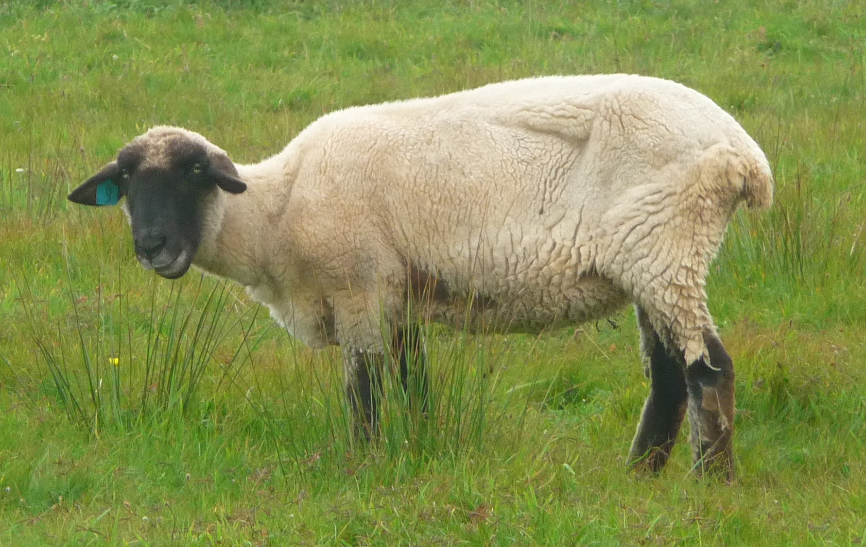 Deutsches schwarzköpfiges Fleischschaf, Aue mit kupiertem Schwanz auf der ostfriesischen Nordseeinsel Juist